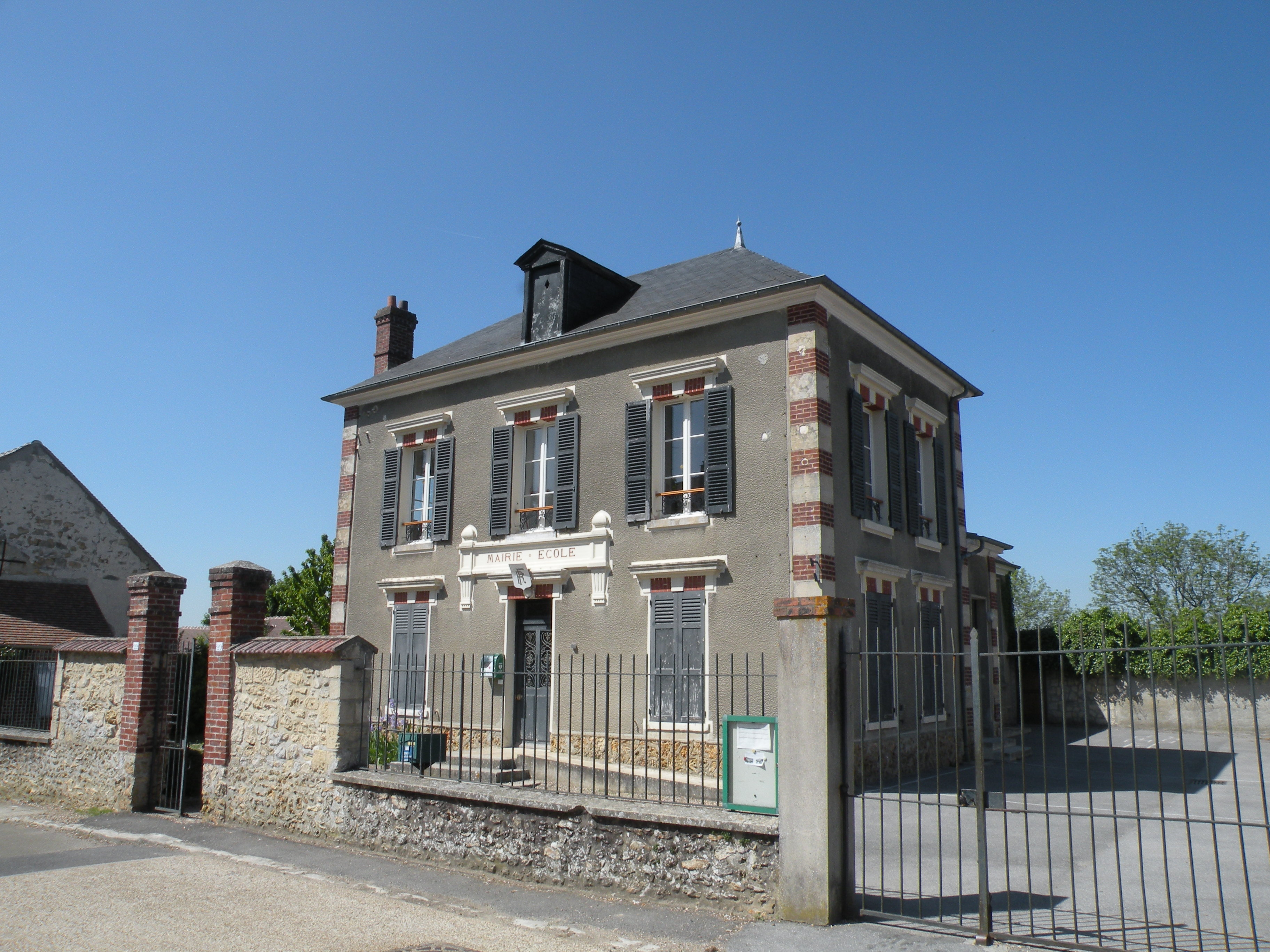 La mairie.